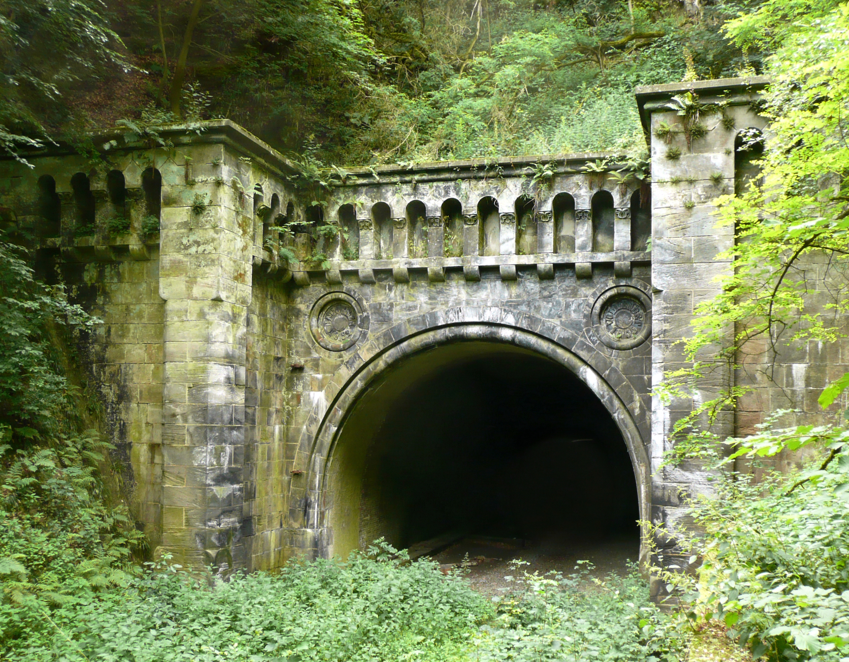 Nordostportal des Volkmarshäuser Tunnels